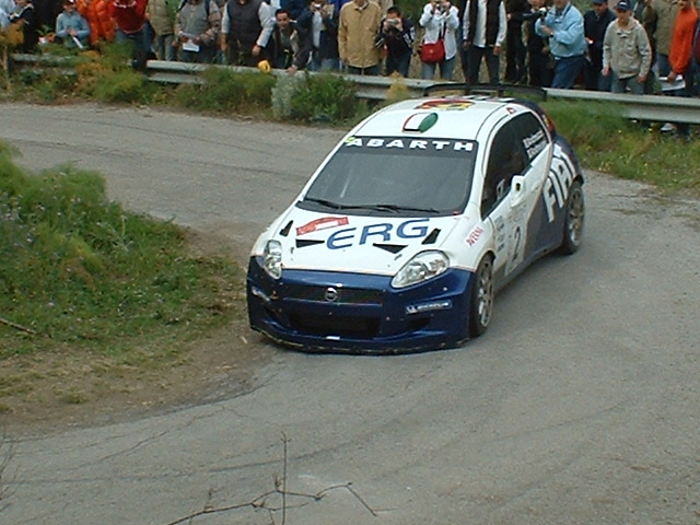 Sicilianu: Andreucci ntâ Targa Floriu dû 2006